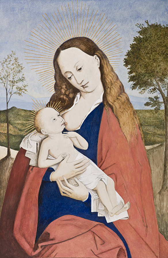 Virgen de Belén